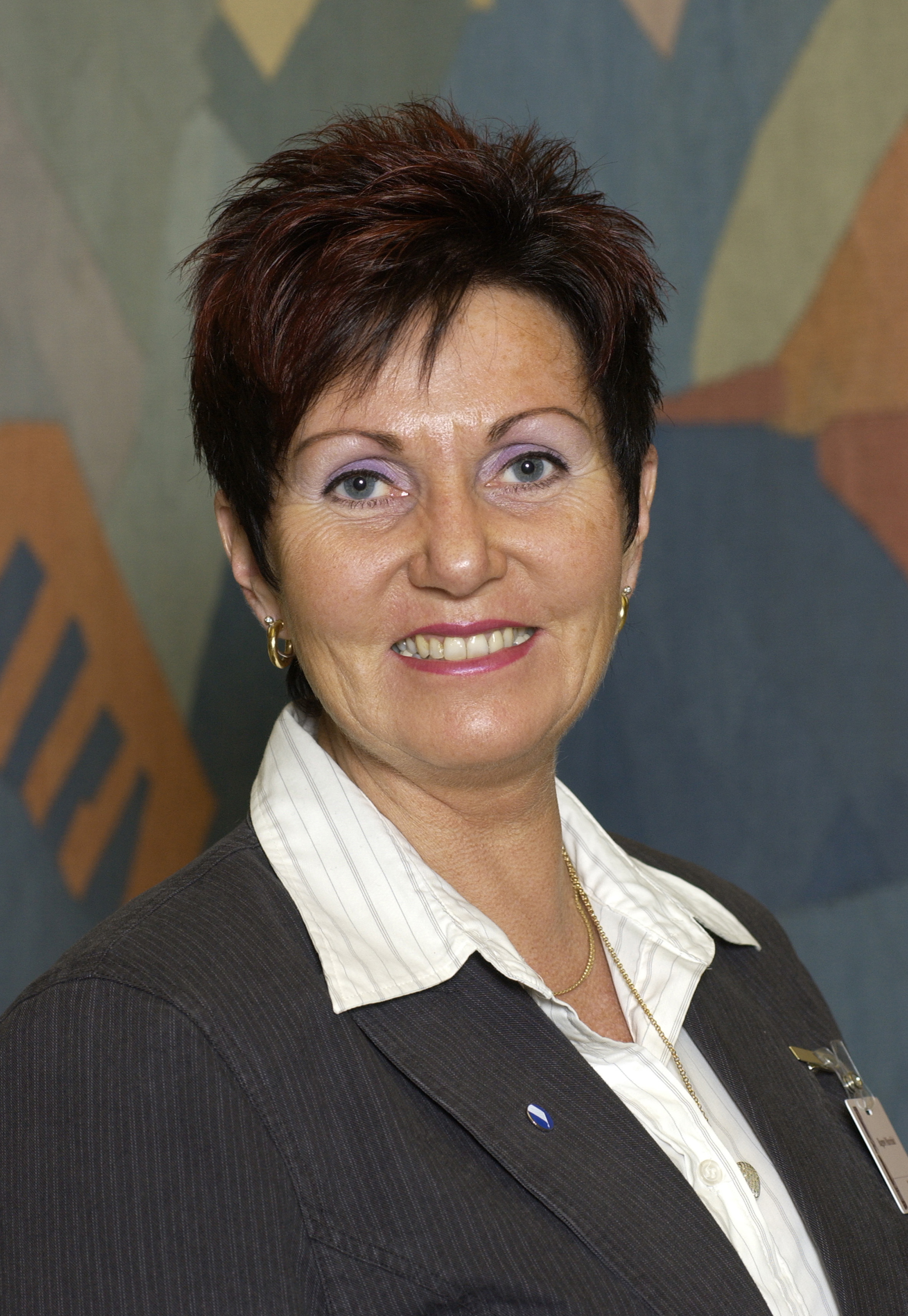 Ragnwi Marcelind, præsidiets talsmand (Bilden är tagen vid Nordiska rådets session i Oslo, 2003)